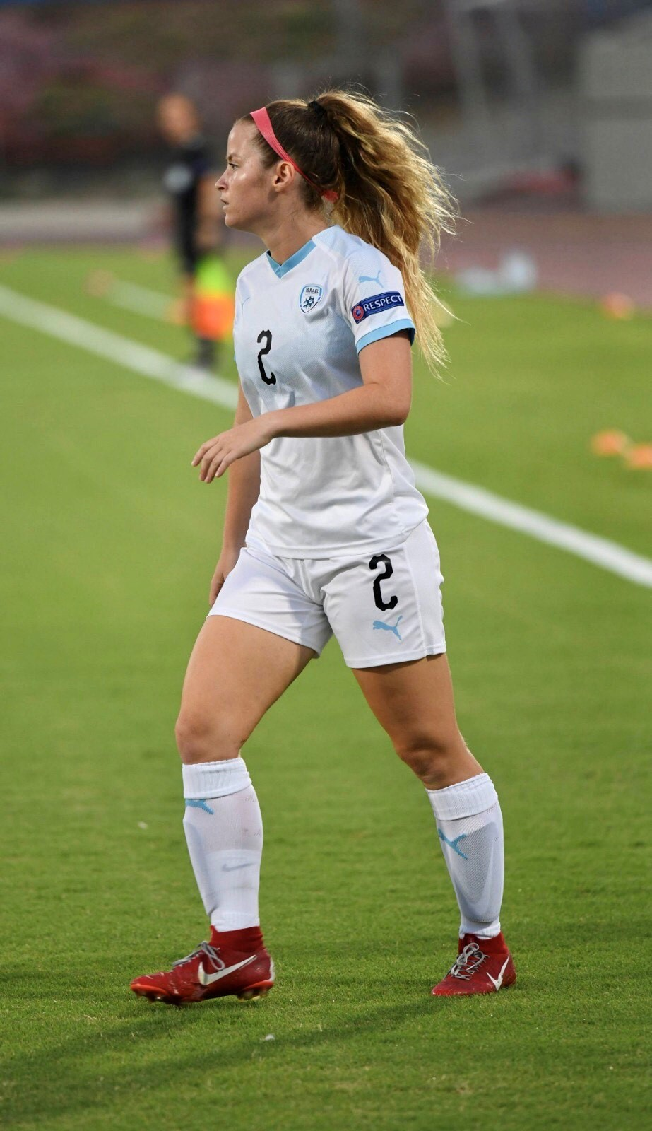 ליה ברקאי - שחקנית כדורגל ישראלית